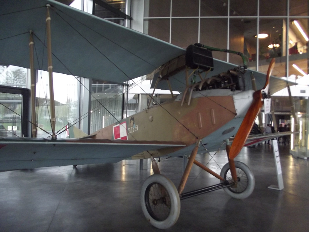 Zdjęcie zrobione podczas VIII Małopolskiego Pikniku Lotniczego na krakowskim lotnisku Czyżyny.